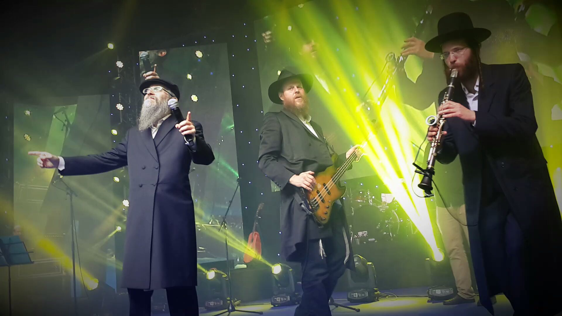 משמאל לימין: אברהם פריד, נהור כרמי, חיליק פרנק. בבניני האומה בי"ט בכסליו תשע"ד